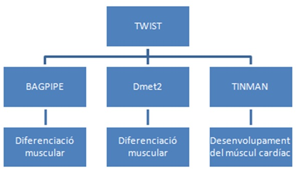 altres factors que s'activen per mitjà de twist1